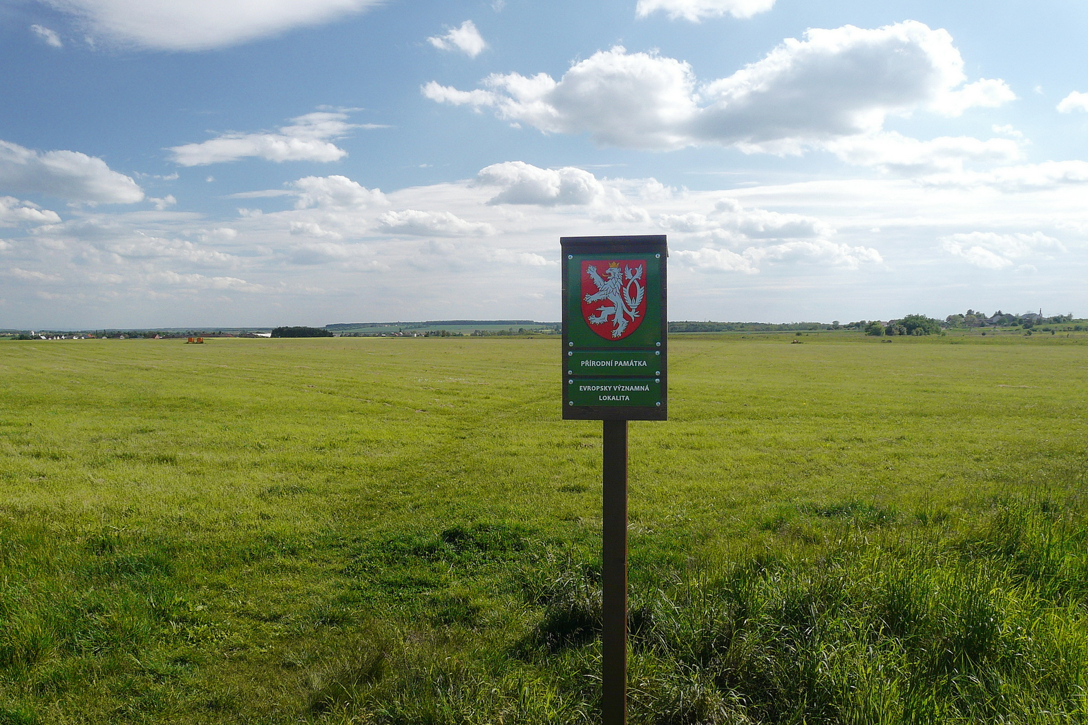 PP Bezděčín, Letiště Mladá Boleslav